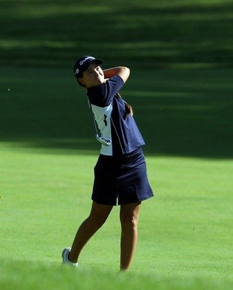 US womens open